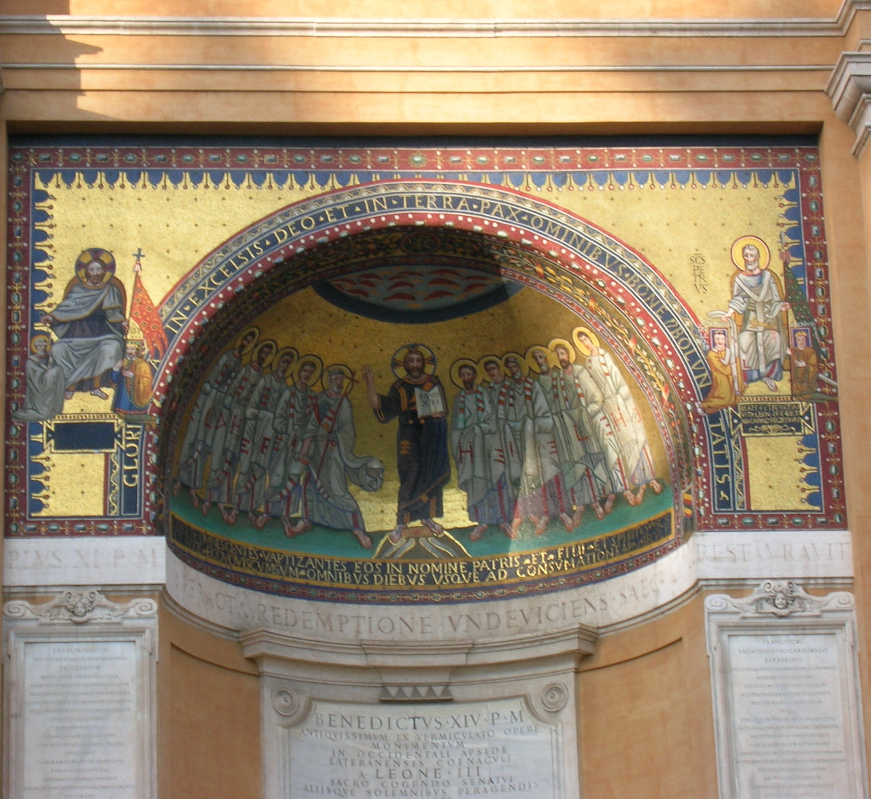 Les mosaiques sur le flanc de la basilique San Salvatore delle Scala Santa a Rome